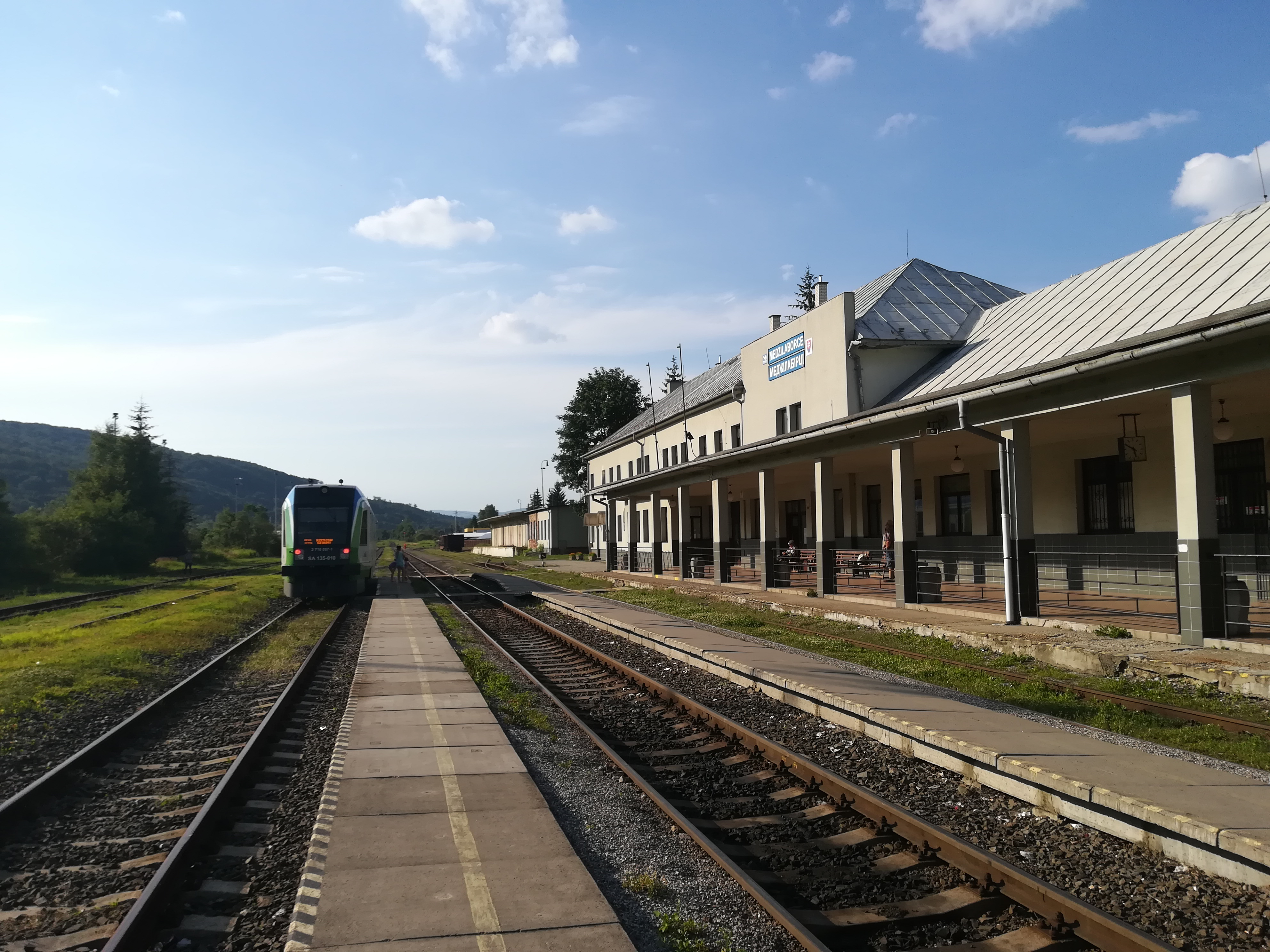 Stacja kolejowa Medzilaborce - Słowacja